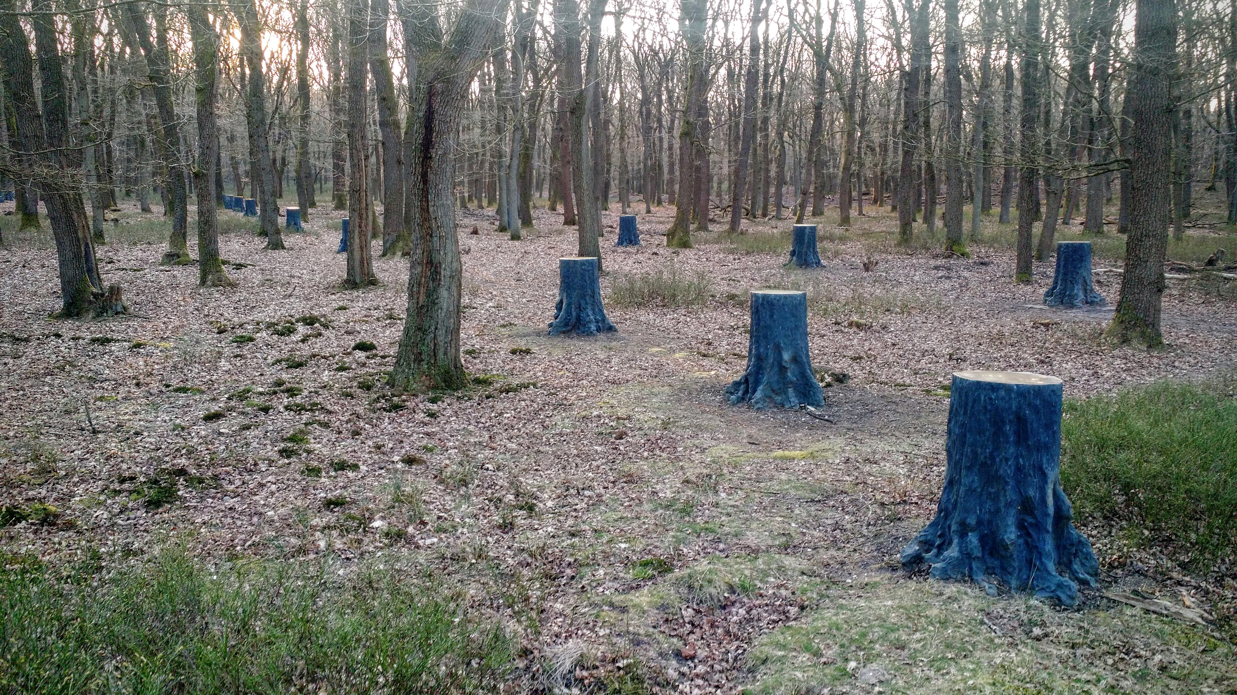 Kunstwerk van Marinus Boezem, geschenk van koningin Beatrix, in het Kroondomein Het Loo te Wenum-Wiesel, gemeente Apeldoorn